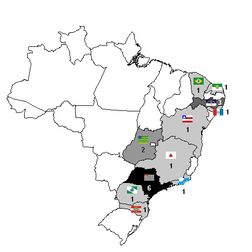 Mapa Série B 2011